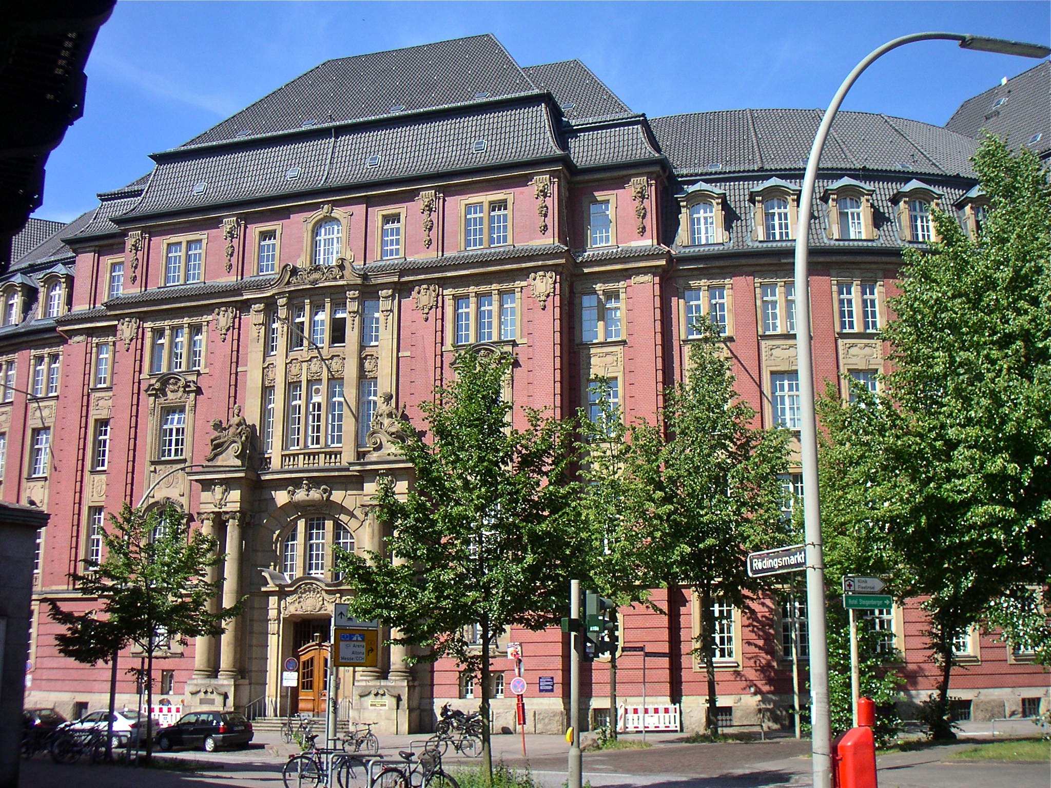 Hamburg, Bürogebäude Rödingsmarkt 2, "Alte Oberfinanzdirektion", Ansicht vom Rödingsmarkt This is a photograph of an architectural monument.